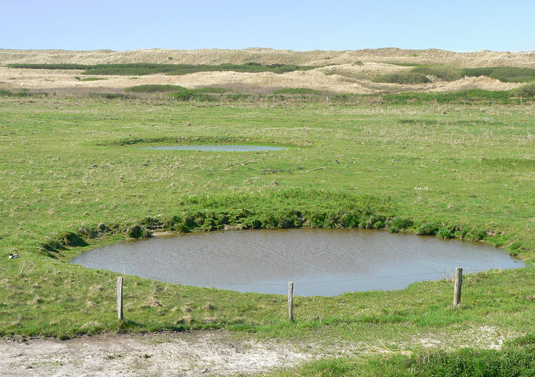 Wangerooge, Bombenkrater